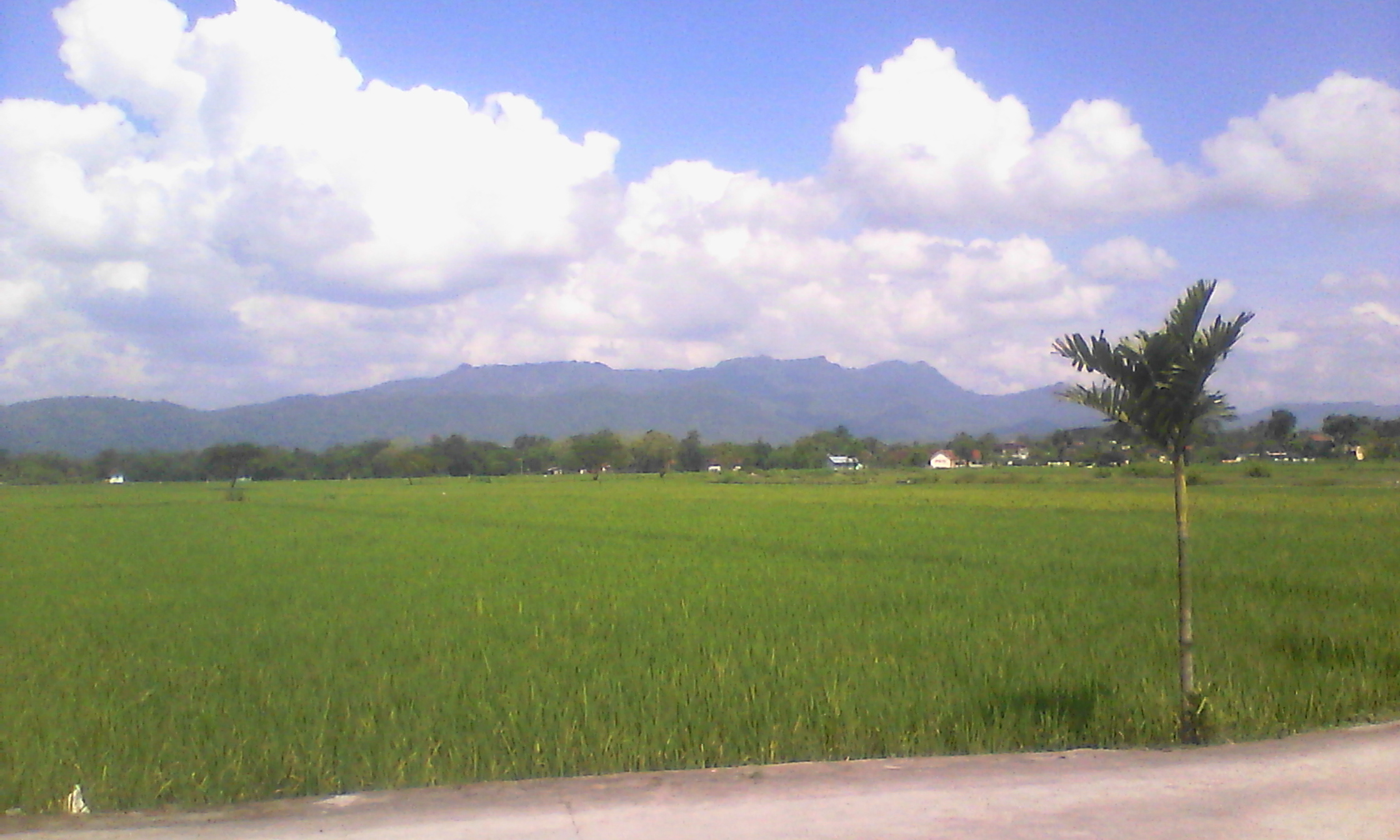 Cawas Klaten